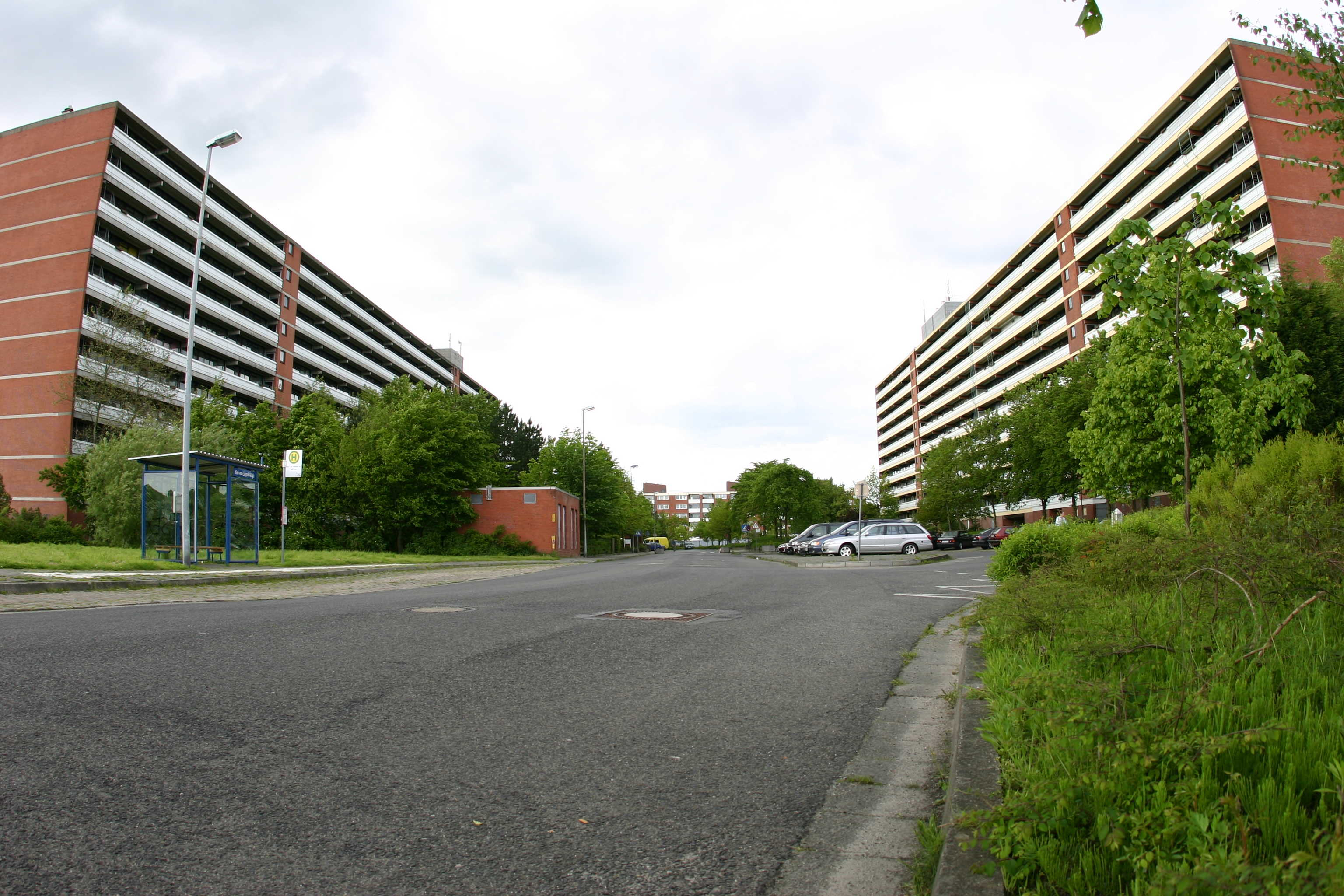 Die so genannten "Glaspaläste" in Emden-Barenburg, die größten Wohnhäuser Ostfrieslands